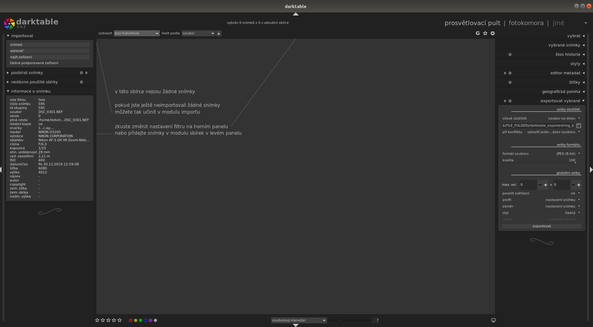 Darktable, jak vypadá po spuštění programu